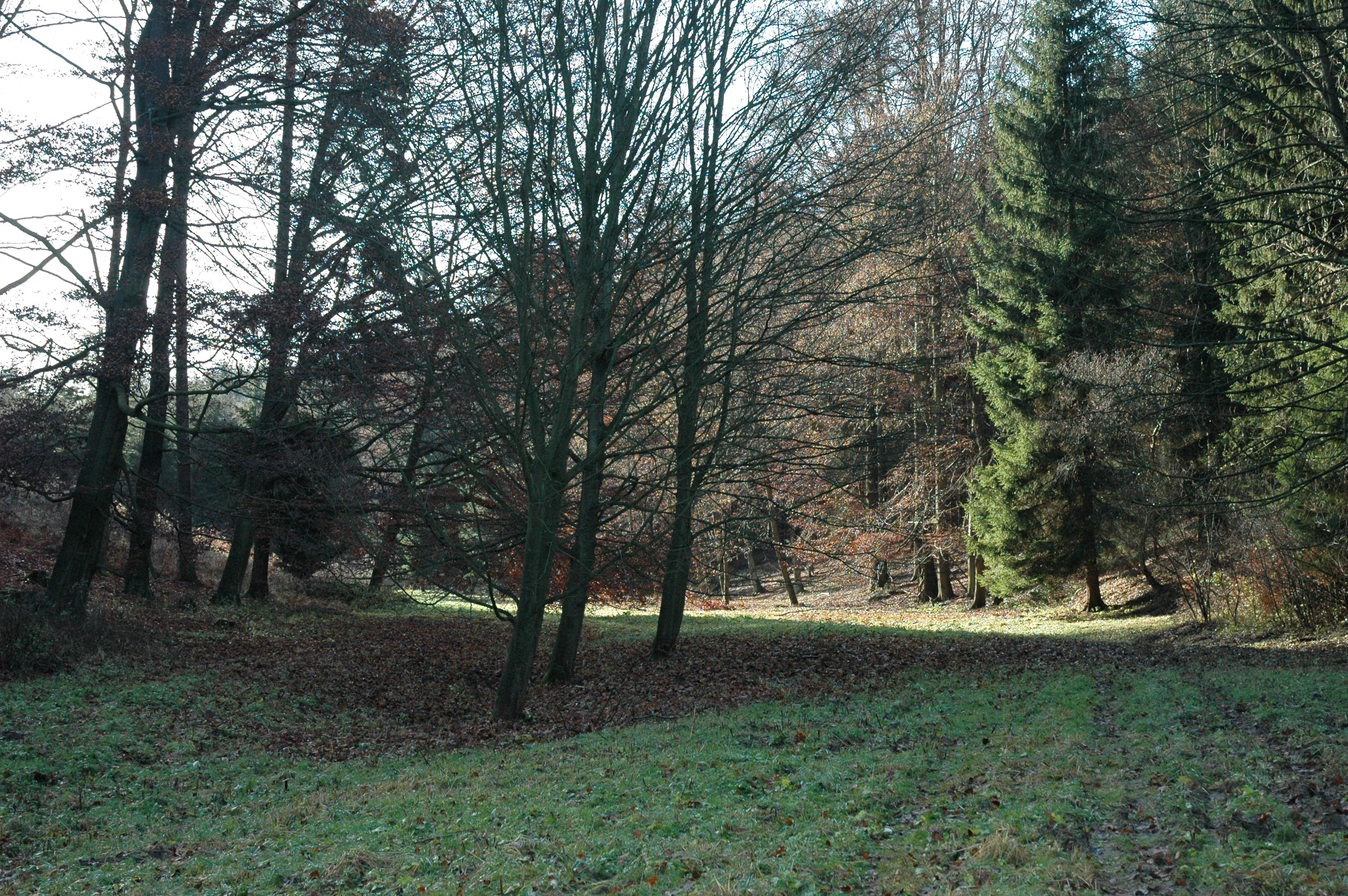 Natural Monument Sněženky ve Vysokém lese, near Polička Town